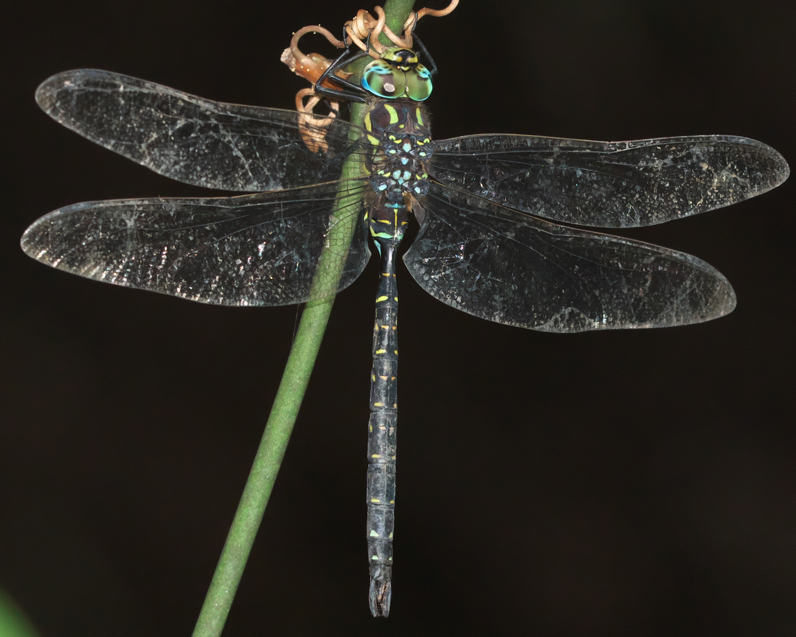 ルリボシヤンマ雄 広島県